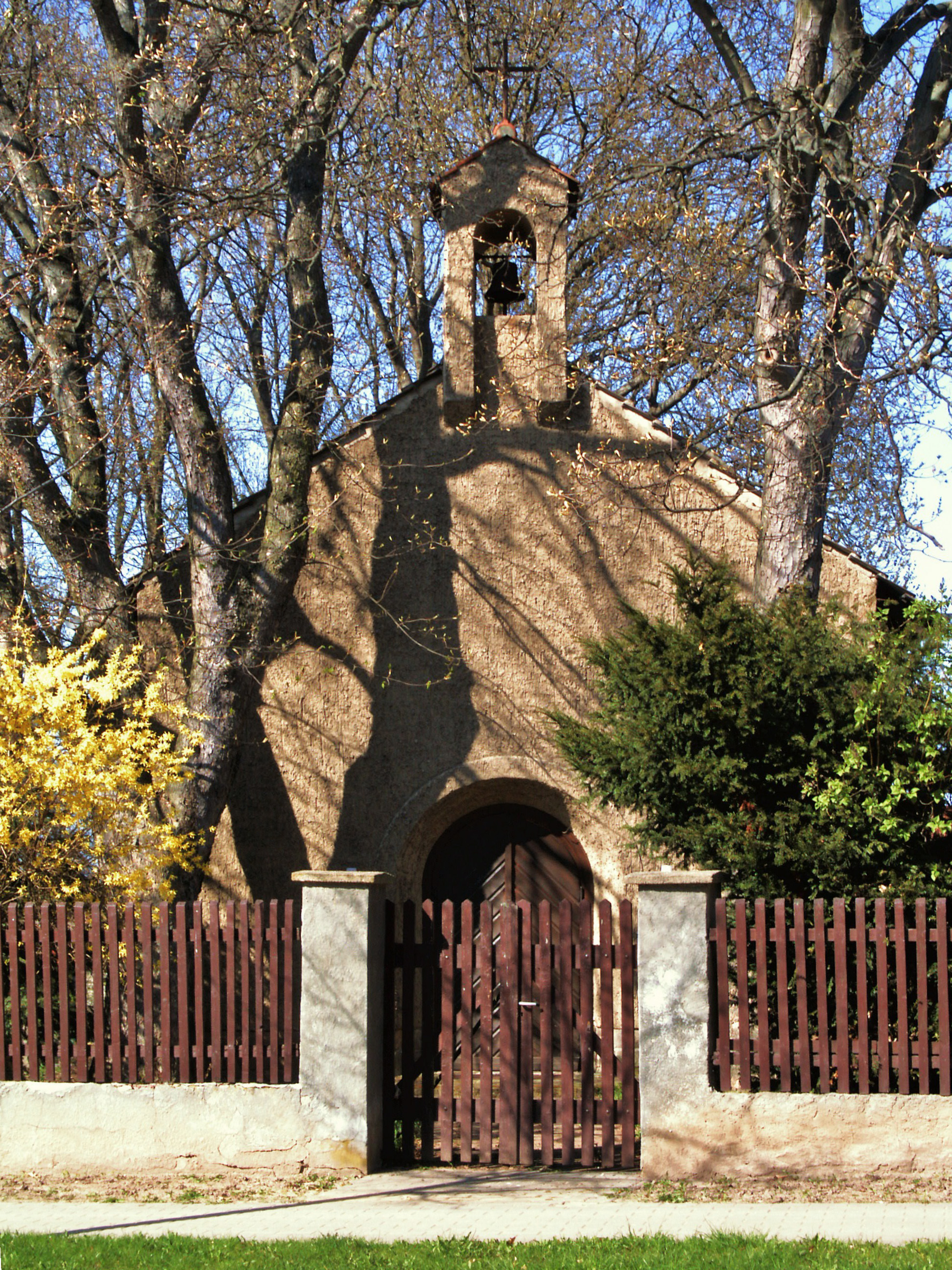 Katholische Kirche St. Josef in Barneberg, Landkreis Börde (im Dezember 2010 profaniert)